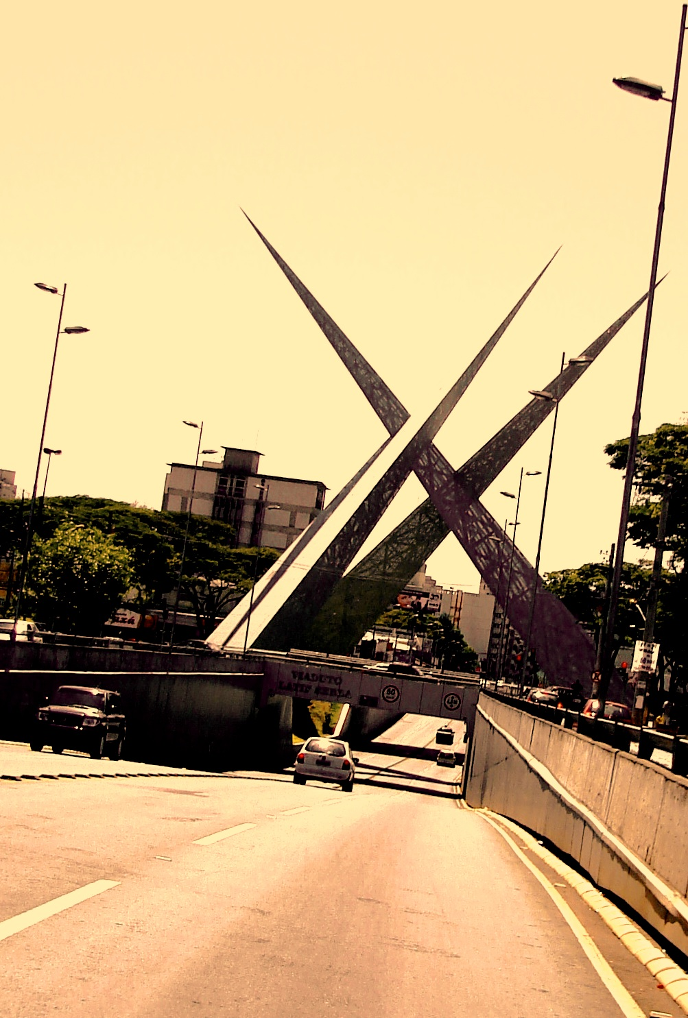 Viaduto na Praça Latif Sebba, em Goiânia, Brasil.